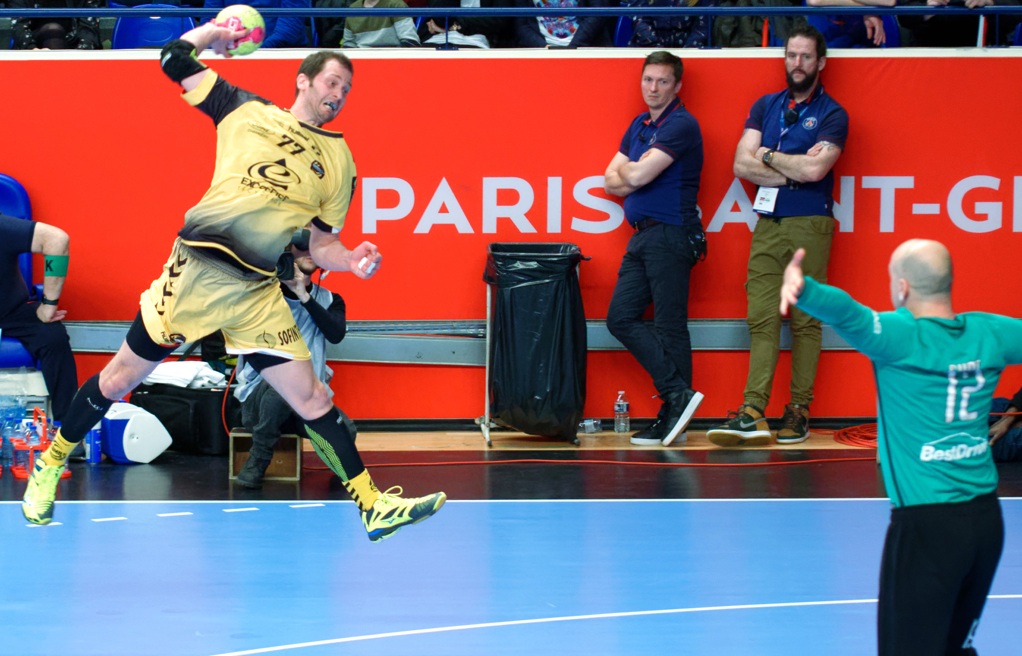 Rencontre de championnat de LidlStarLigue entre le PSG et chambéry. A coubertin, le 15 mars 2017.